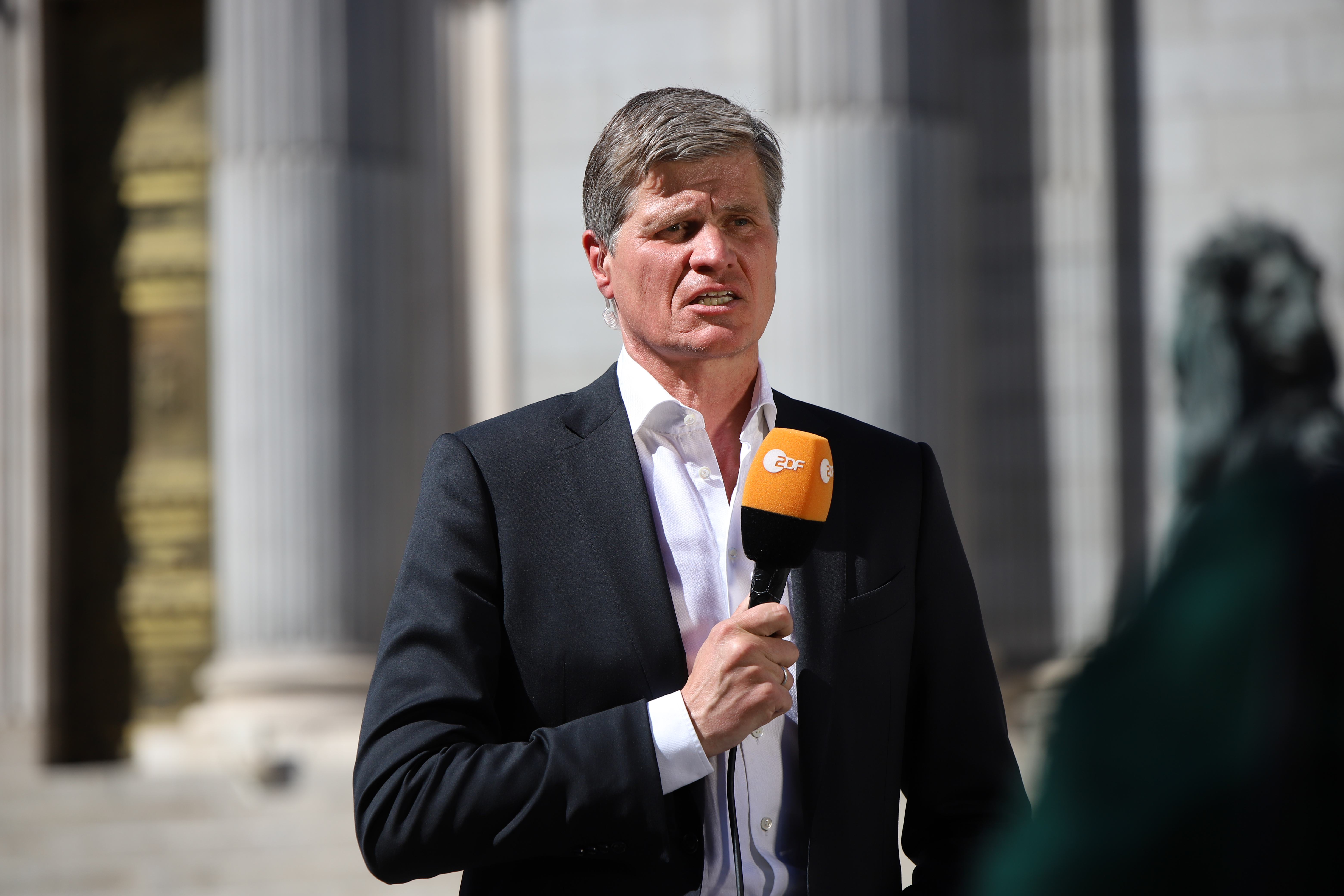 Journalist Thomas Walde bei einer Live-Schalte vor dem Congreso de los Diputados in Madrid am Tag der ersten spanischen Parlamentswahl im Jahr 2019.